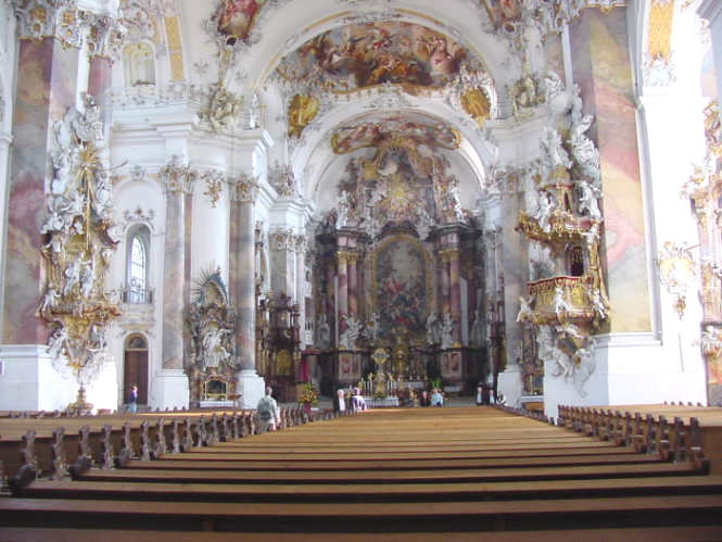 Basilika zu Ottobeuren